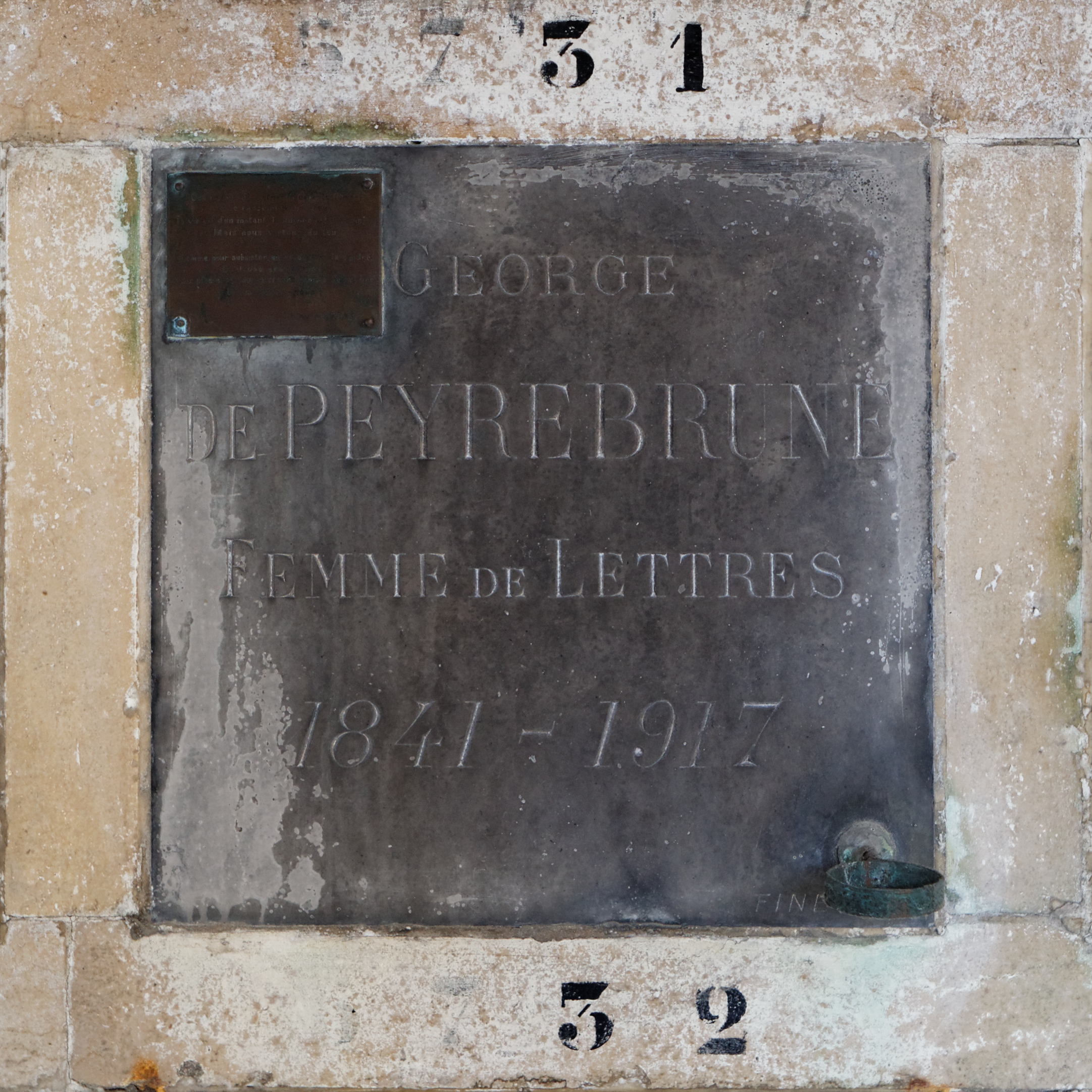 Case du columbarium du cimetière du Père-Lachaise.